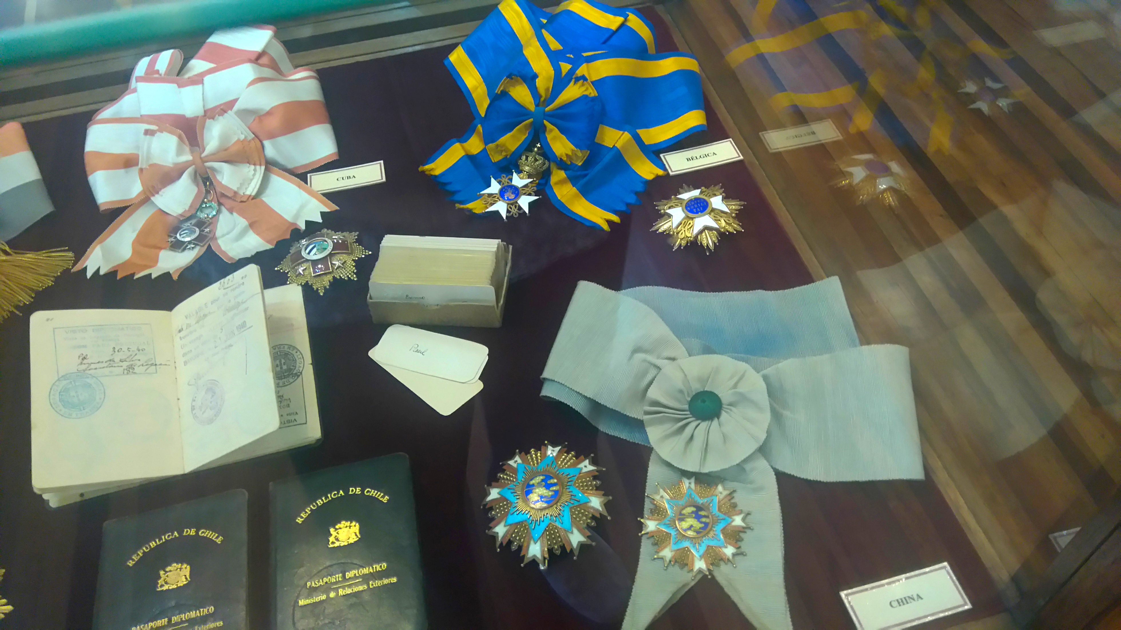 Condecoraciones otorgadas al ex presidente chileno por los gobiernos de Bélgica, Cuba y China.